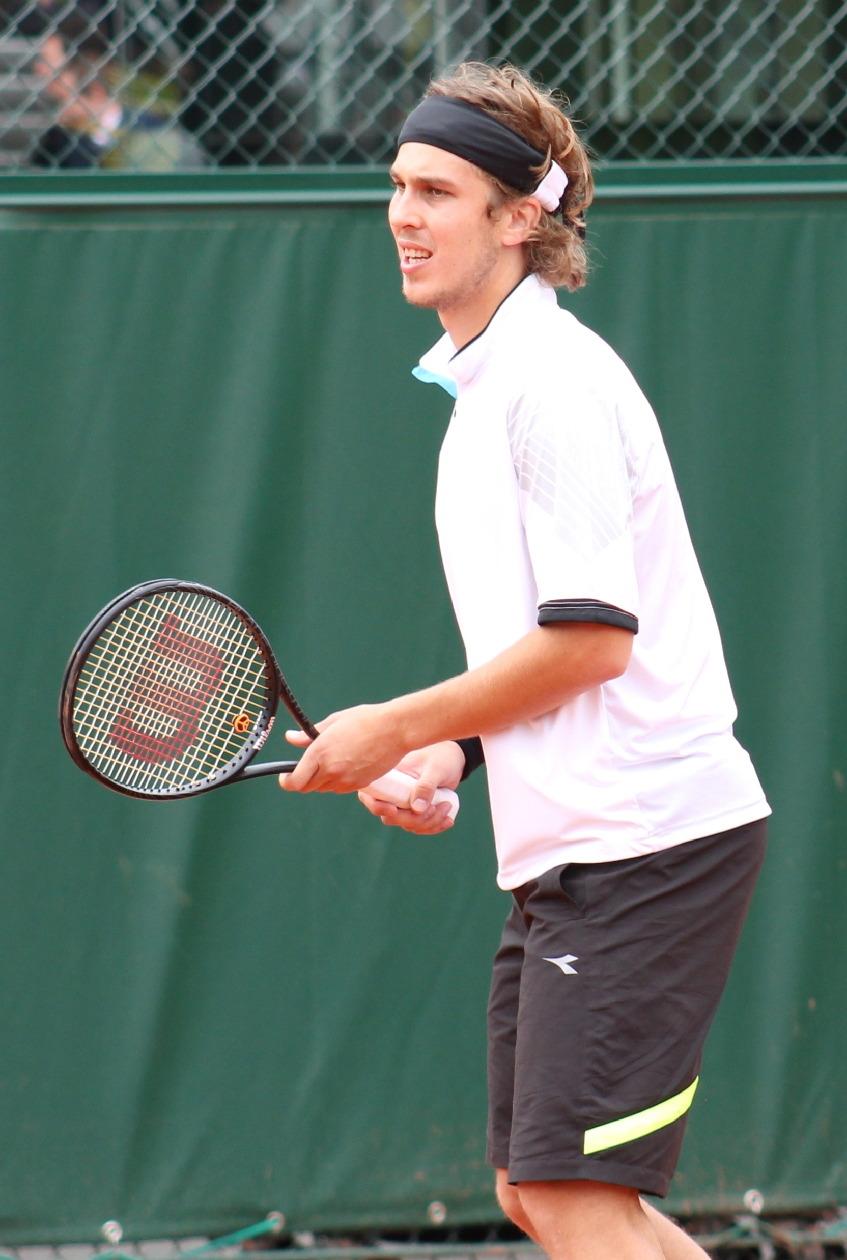 Lacko RG13 (6)